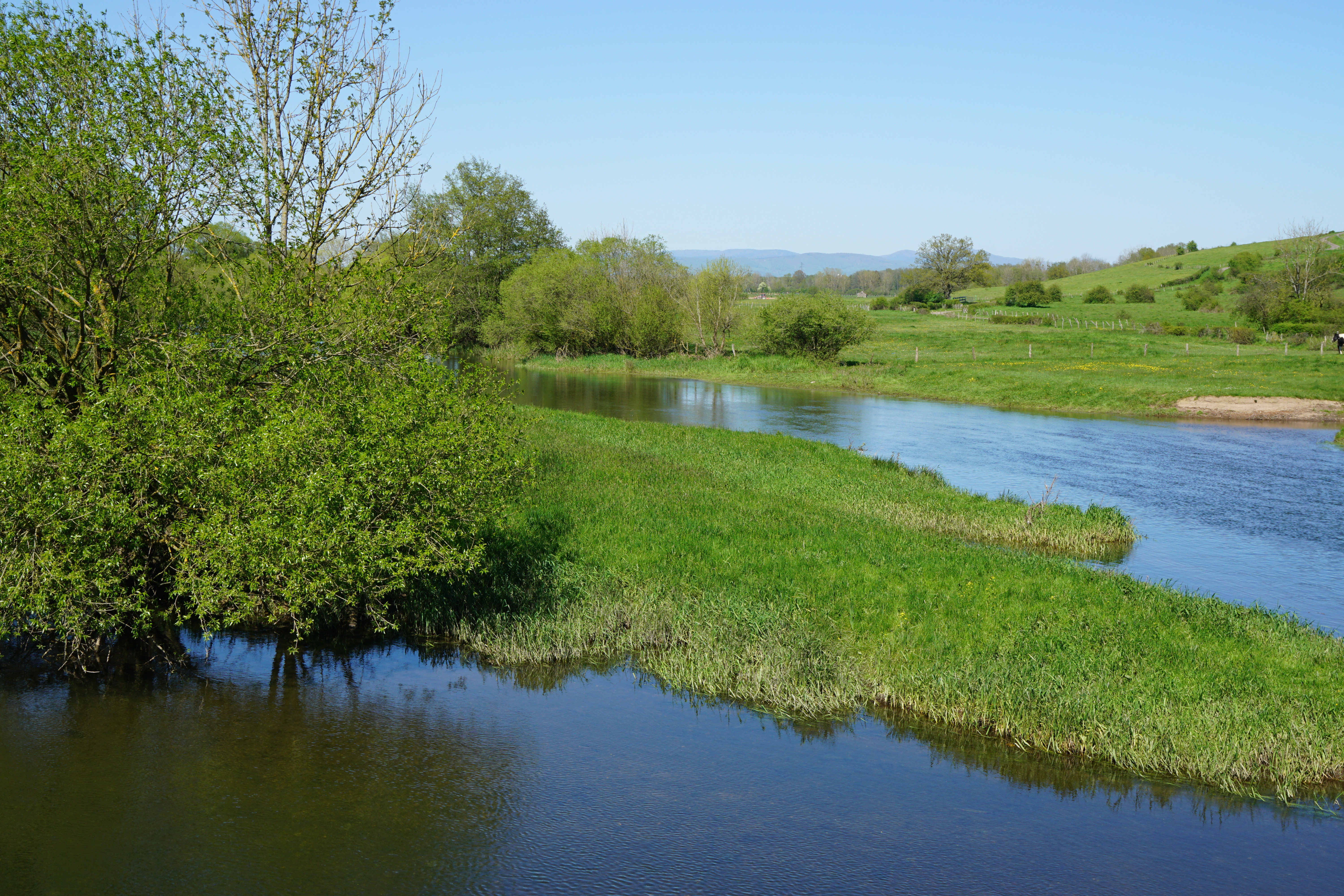 Les Aynans : pont ou l'Ognon et la Rahin s'unissent.